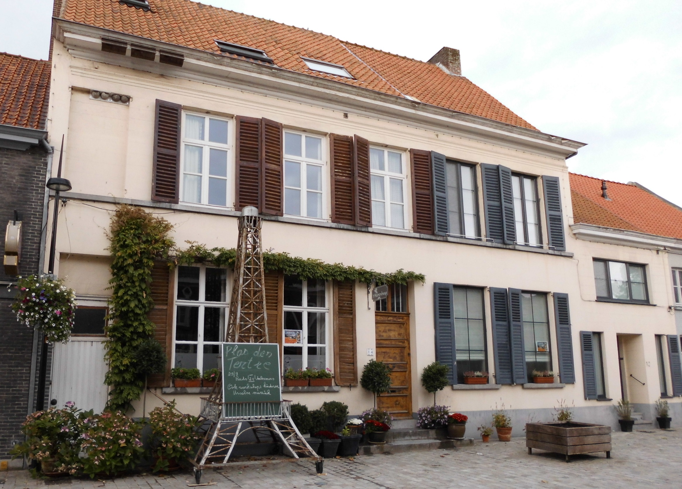 Herenhuis - Urseldorp - Ursel - Knesselare - Oost-Vlaanderen - België